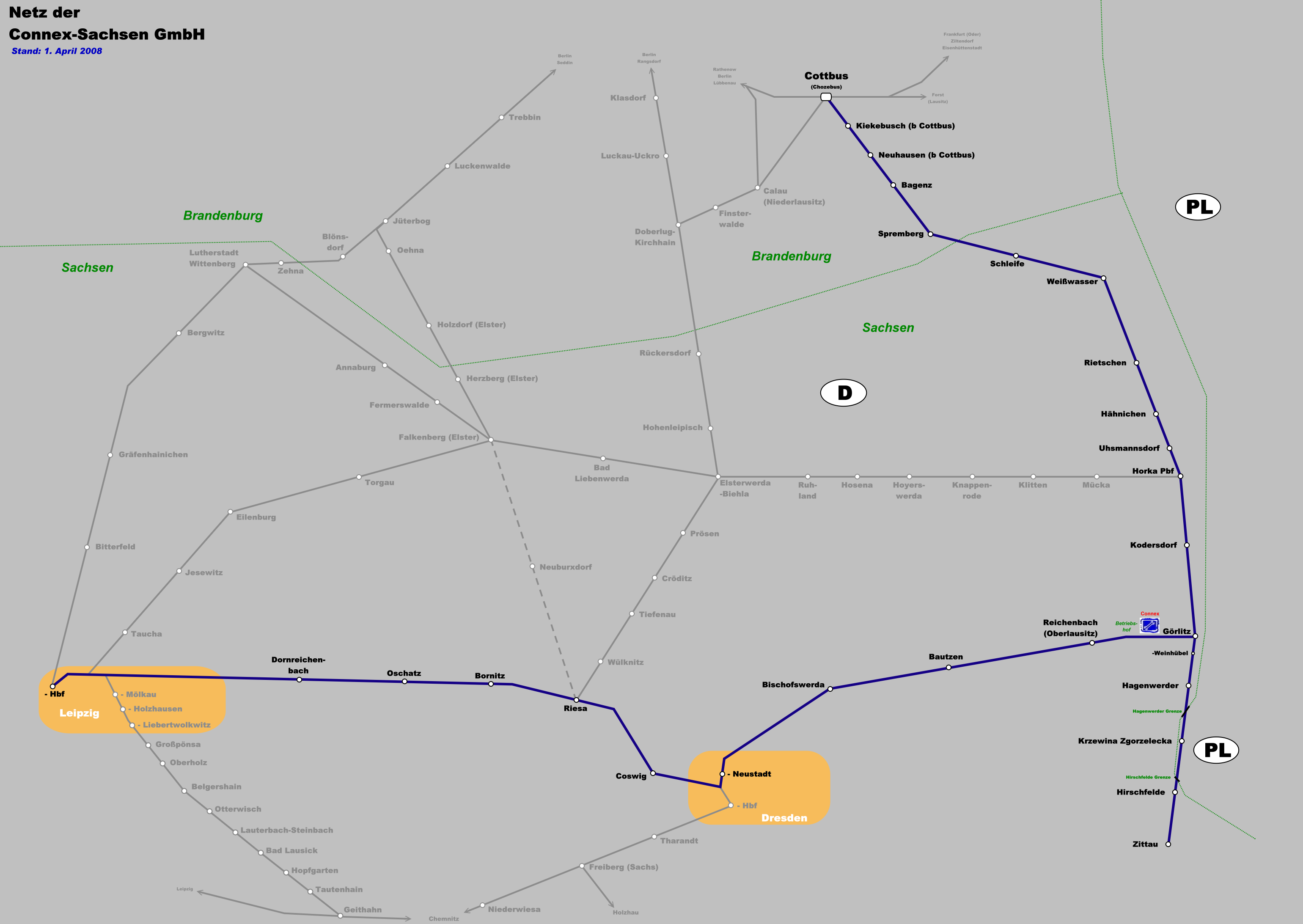 Netz der Connex Sachsen GmbH (bis Dezember 2008)